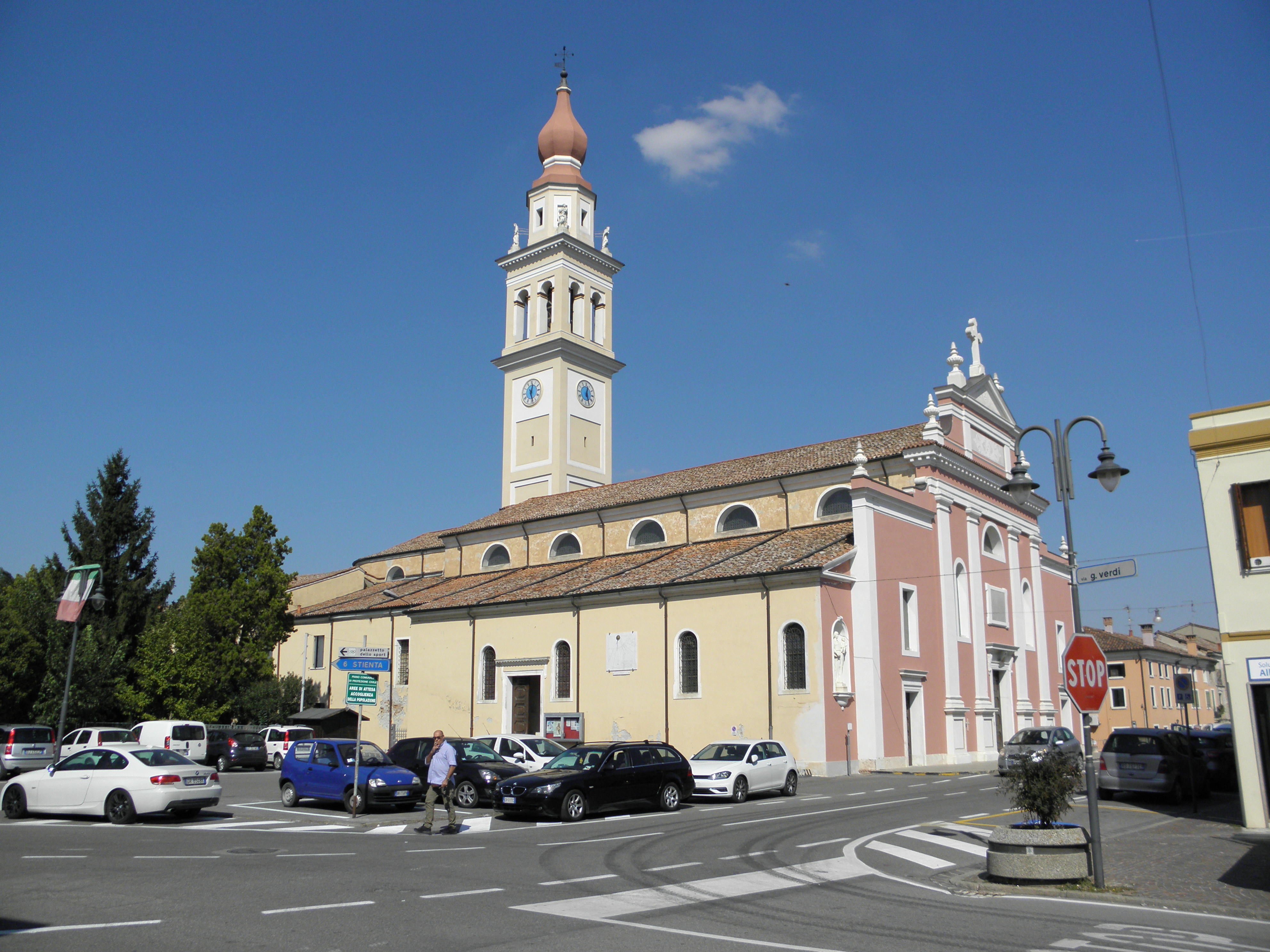 Fiesso Umbertiano, chiesa parrocchiale della Natività della Beata Vergine Maria.